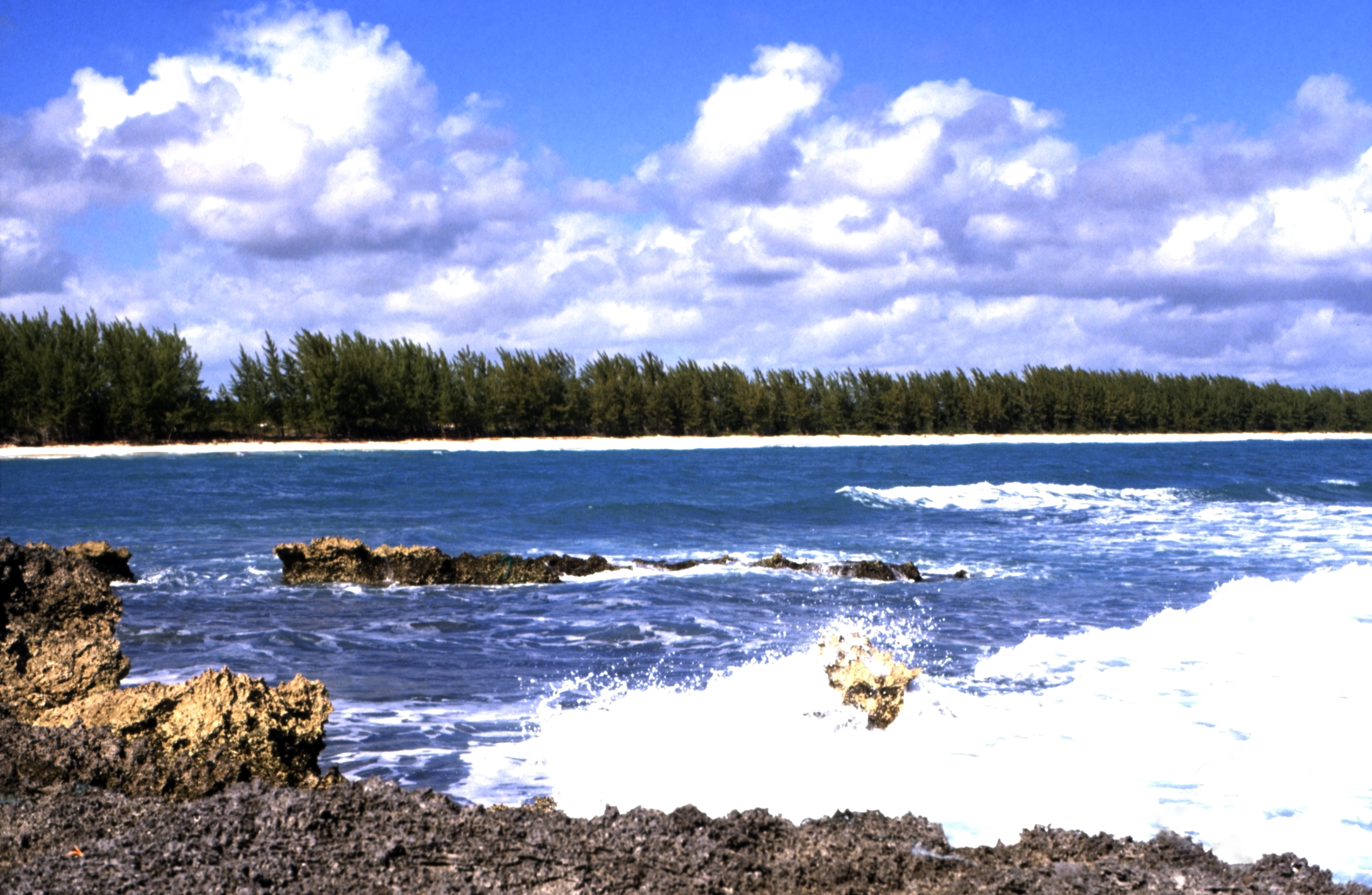 Irgendwo an einem Strand auf Great Abaco oder auf Green Turtle Cay.